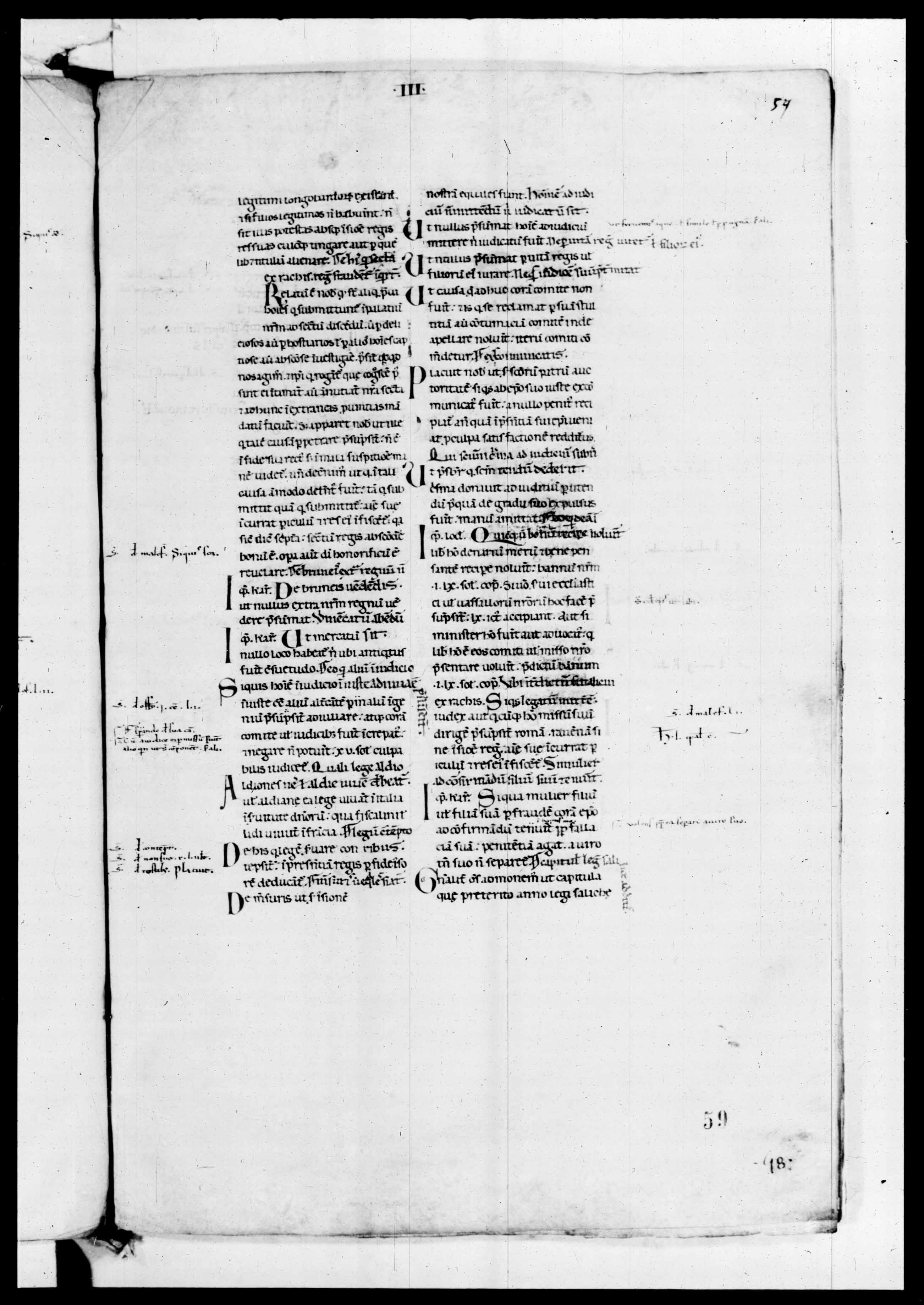 manuscript in lat. Città del Vaticano, Biblioteca Apostolica Vaticana, Fondo Reginense latino, Reg. lat. 1060. - secolo 12. - ff. 72 : membranaceo. ((Dolezalek in Manuscripta Juridica data il codice "saec. XII ex."